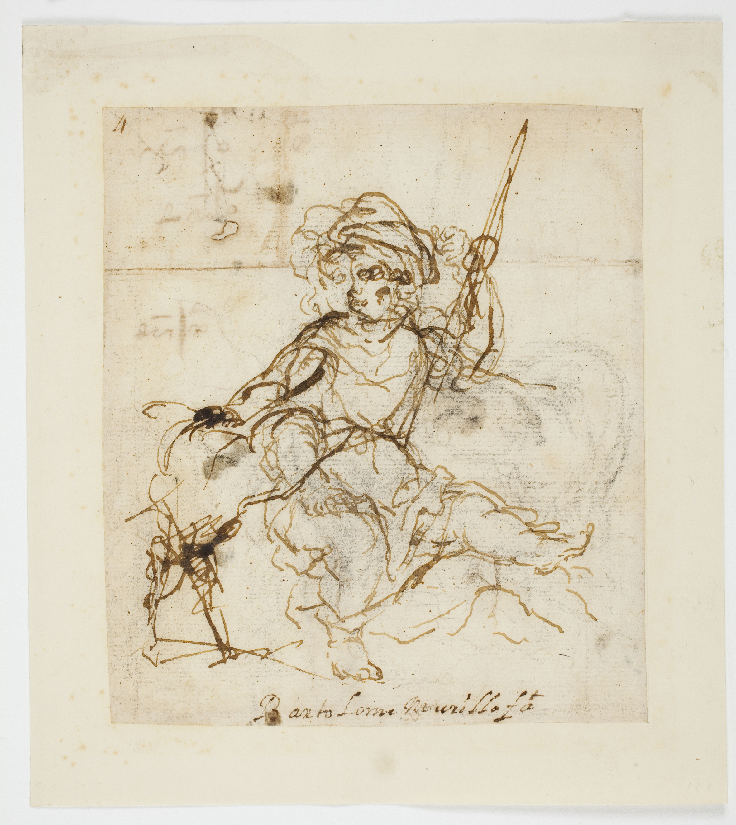 El Buen Pastor, 134 × 118 mm. Madrid, Museo del Prado.